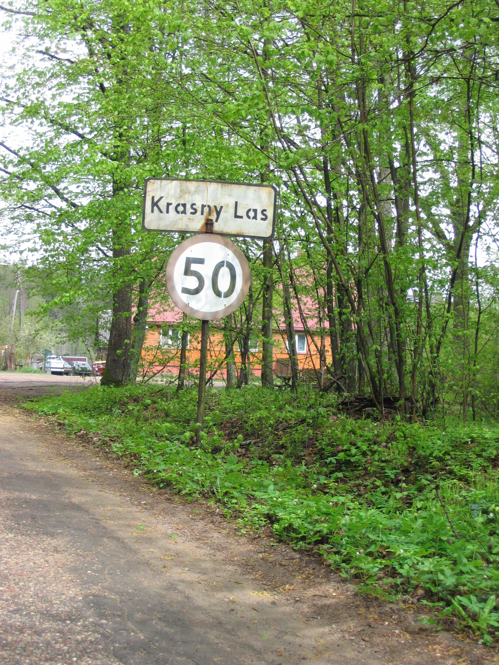 Wjazd do miejscowości Krasny Las (gmina Supraśl) od strony południowej.